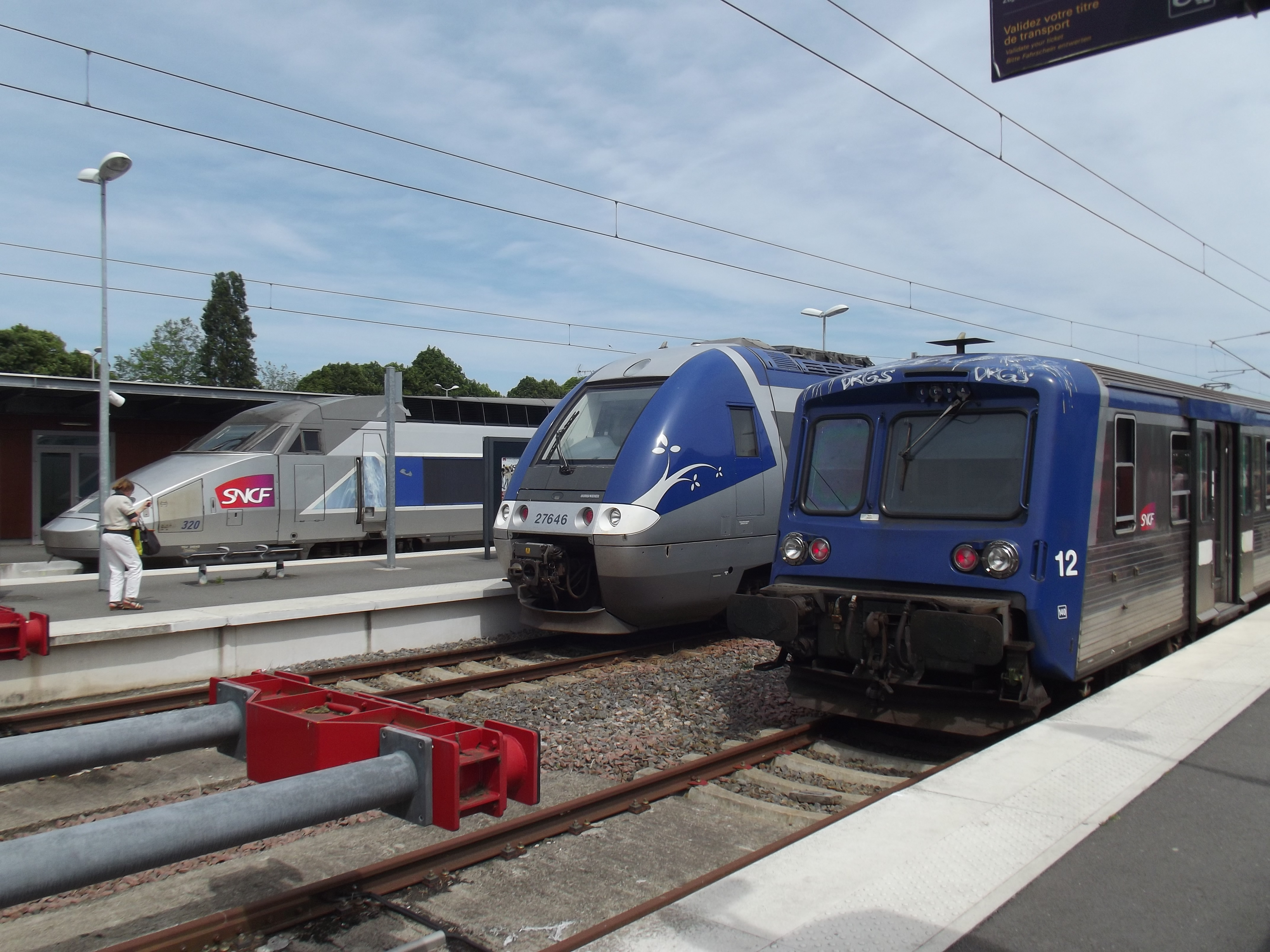 Een TGV en TER treinen in het kopstation van Saint-Malo